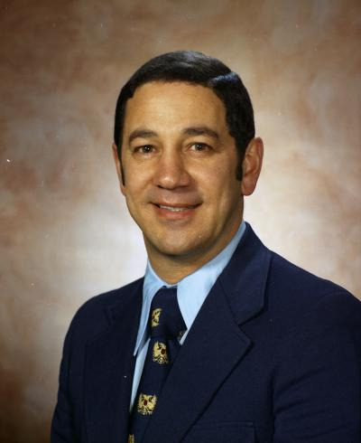 Senator Joe Stortini, 1973